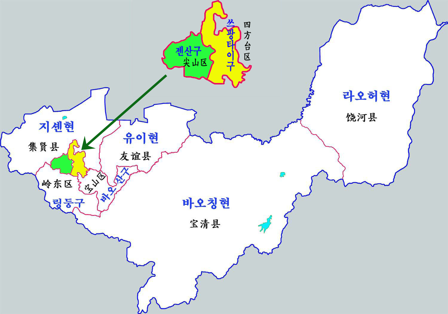 솽야산시 현급구역